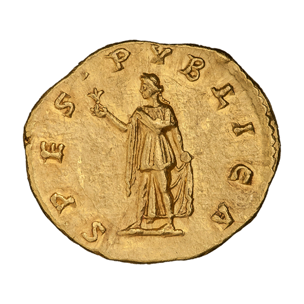 Ауреус. Коммод, цезарь. Ок. 175—176 гг. (реверс). Надпись SPES PVBLICA. Спес (персонификация надежды) стоит, влево; поддерживает край одежды левой рукой, в правой поднятой руке цветок.